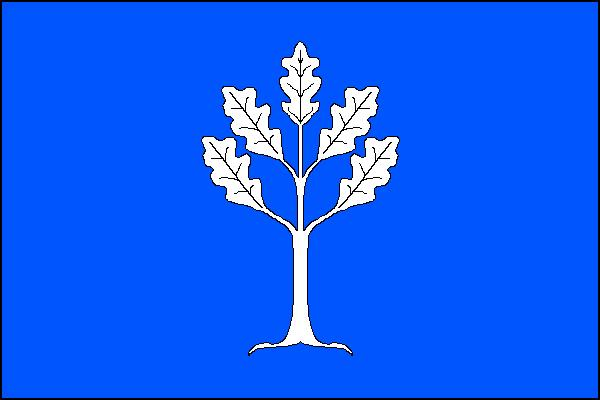 Vlajka obce Doubrava (okres Karviná)